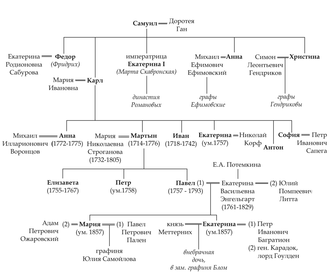 Древо Скавронских